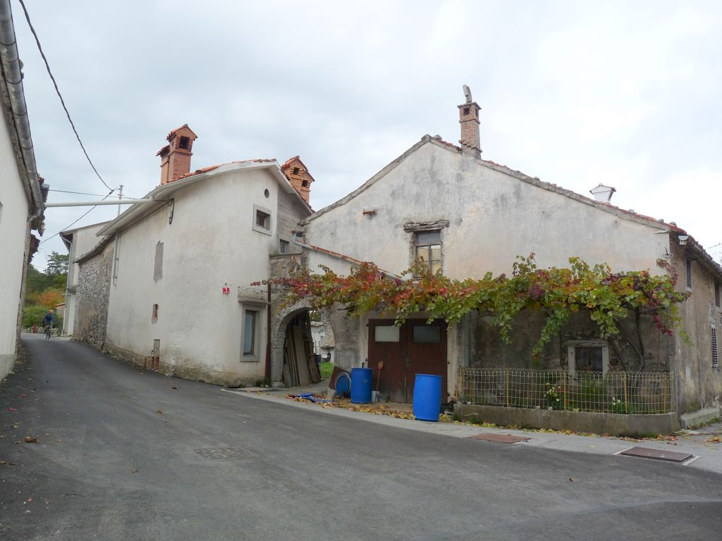 Jakovce